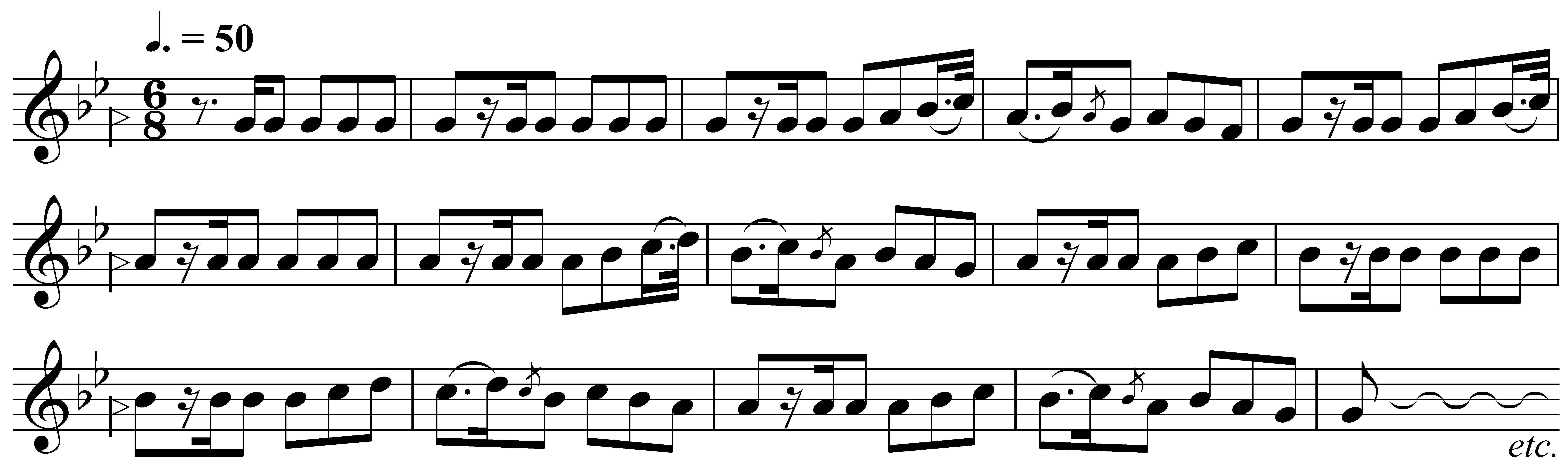 رِنگ ضرب اصول از ردیف موسی معروفی